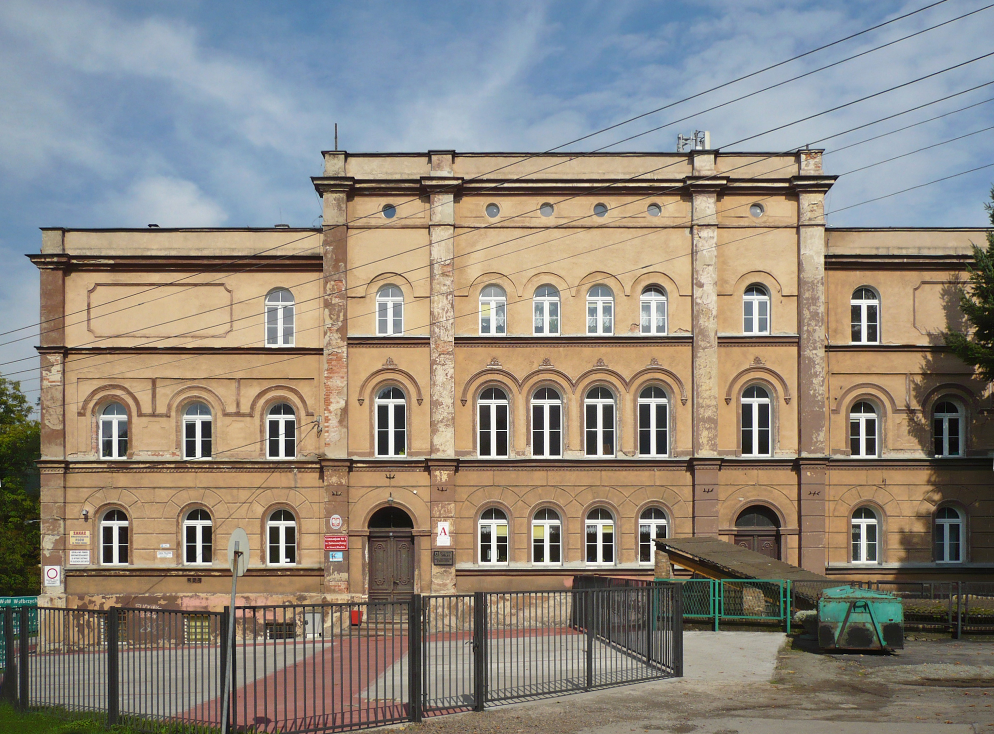 Nowa Ruda. Gimnazjum Nr 1